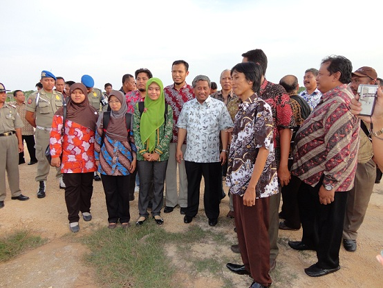 SAMPANG – Kabupaten Sampang berencana membangun Politeknik pertama yang ada di Madura. Anggaran yang dibutuhkan diperkirakan mencapai Rp100 miliar. Dana ini bantuan dari Kementerian Pendidikan Nasional (Kemendiknas). Kendati demikian, sejumlah kalangan menyangsikan rencana ini, karena mengurusi pendidikan tingkat SD dan SMA saja Pemkab Sampang masih dianggap tidak becus. “Pembangunan Politeknik ini akan direalisasikan tahun 2012. Rencana itu bertujuan untuk meningkatkan sumber daya manusia (SDM) di Madura. Terutama untuk mempersiapkan beroperasinya kegiatan eksploitasi migas (minyak dan gas) yang membutuhkan tenaga terampil,” kata Heri Purnomo, Kepala Dinas Pendidikan (Dispendik) Sampang, Senin (11/7). Pembangunan Politeknik pertama dipilih Sampang, tambahnya, karena Menteri Pendidikan Nasional, M Nuh menilai posisi Sampang sangat strategis, berada di tengah-tengah, di antara 3 kabupaten yang ada di Madura. Sehingga aksesnya mudah dijangkau bagi daerah lain di Madura yang berminat melanjutkan pendidikan ke jenjang lebih tinggi. Selengkapnya bisa Anda baca di sumber refrensi sbb: Surabayapost